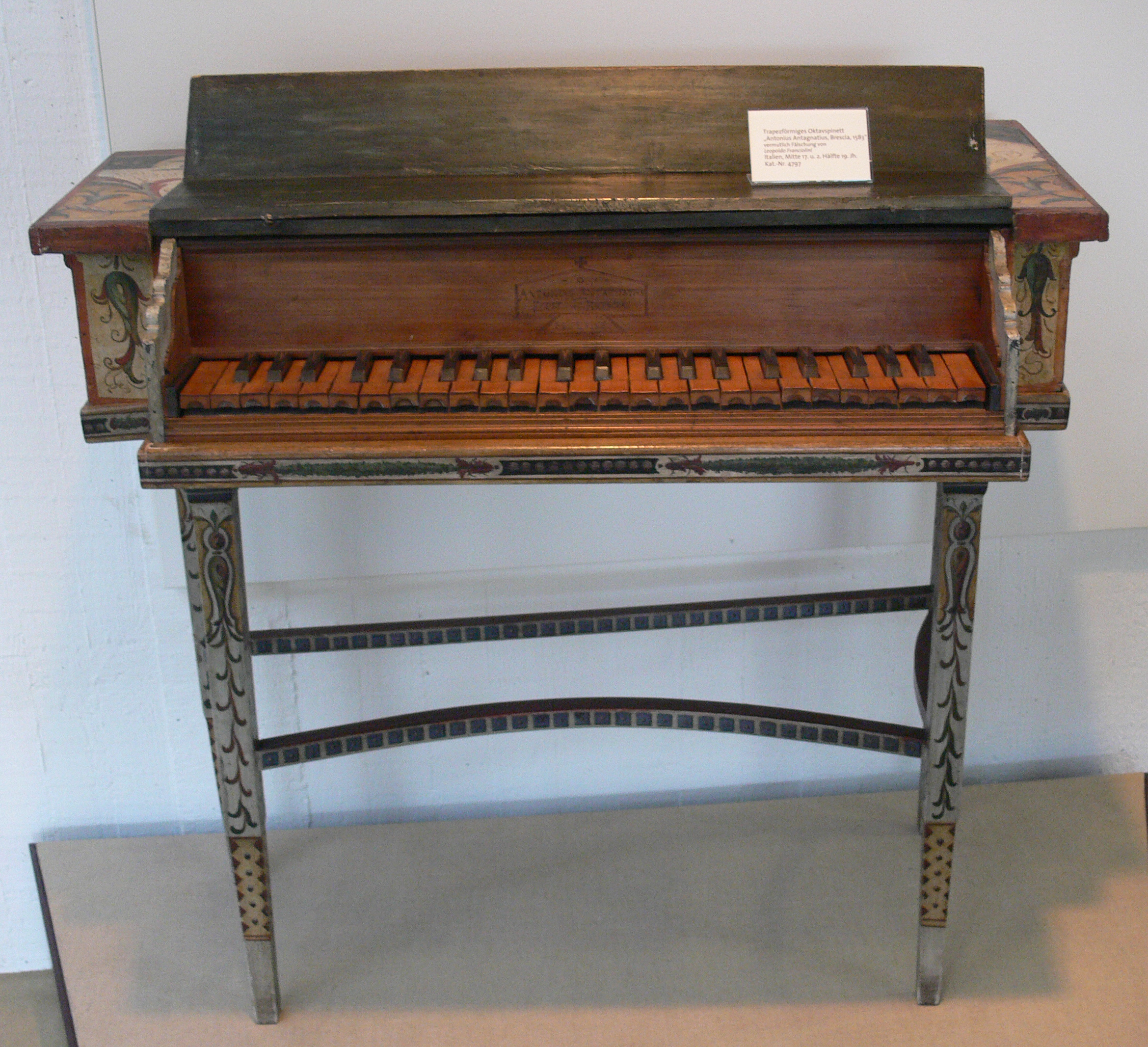 Trapezförmiges Oktavspinett, bezeichnet „Antonius Antagnatius, Brescia, 1583“ (vermutlich Fälschung von Leopoldo Franciolini). Italien, Mitte 17. Jh. und 2. Hälfte 19. Jh. Musikinstrumentenmuseum Berlin, Kat.-Nr. 4797